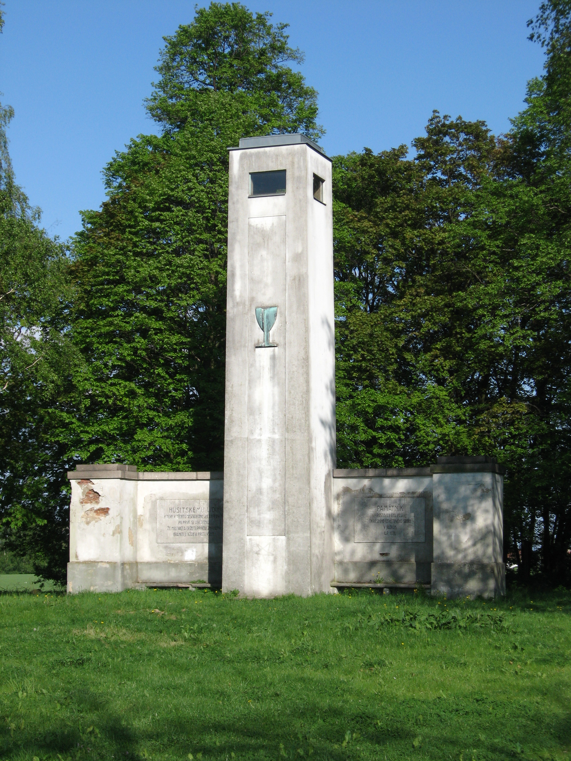 Mandava